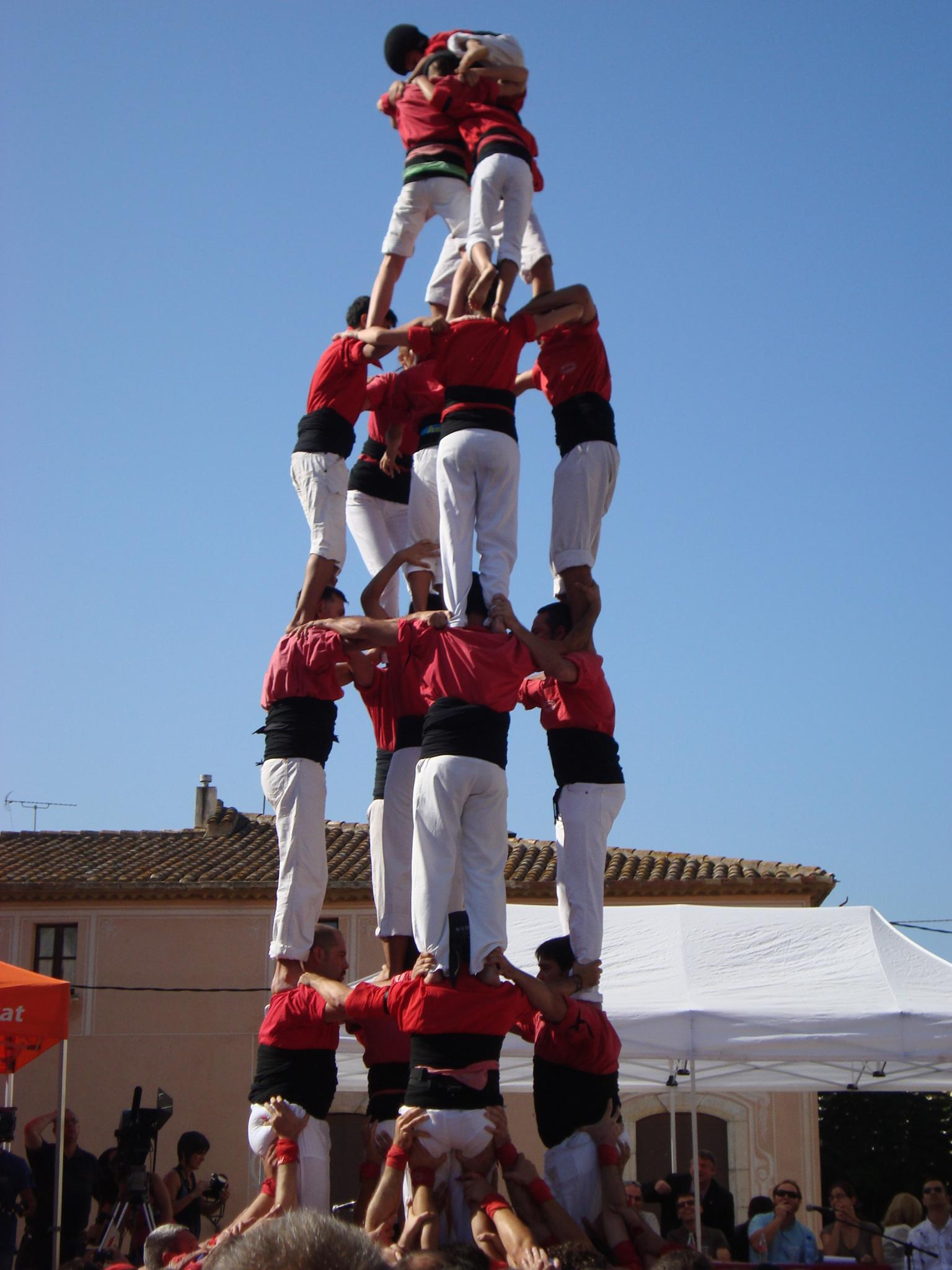 4de7a dels Minyons de l'Arboç. Concur7 2011